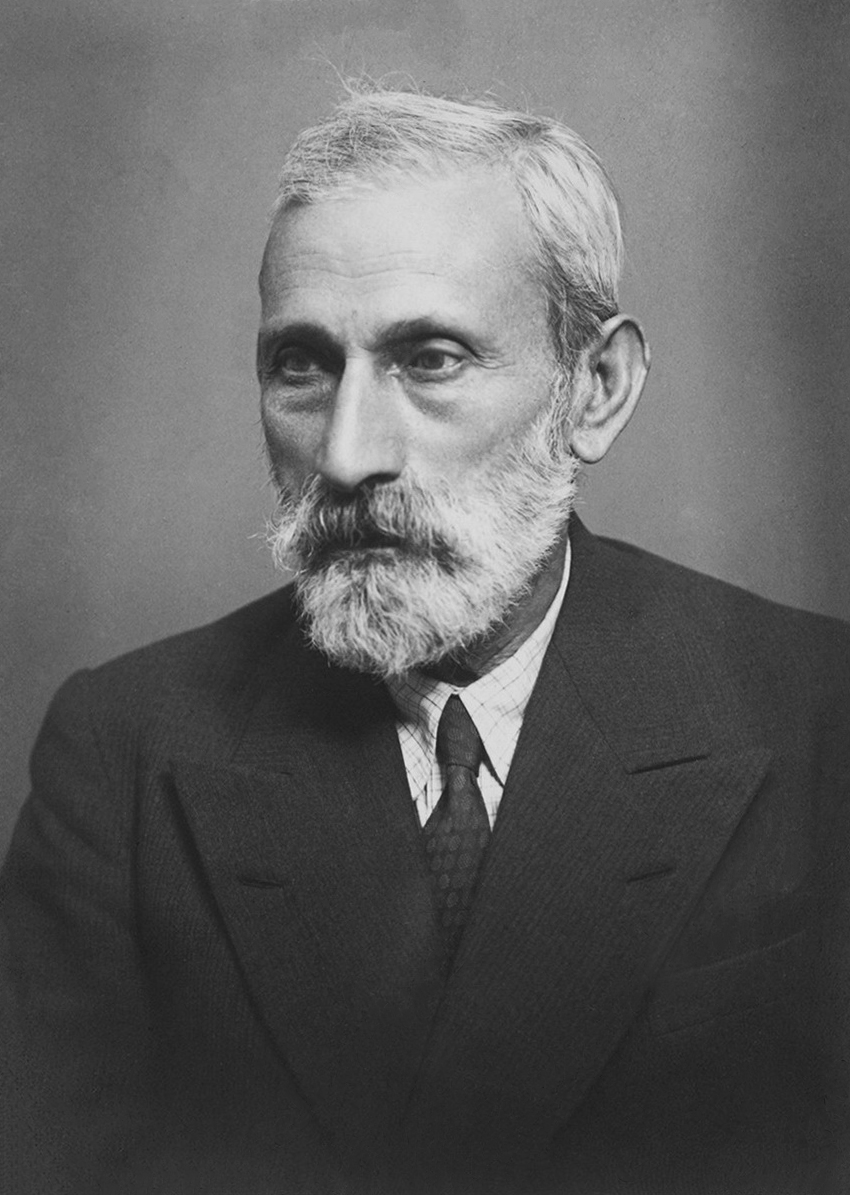 Hüseynzadə Əli bəy Hüseyn oğlu